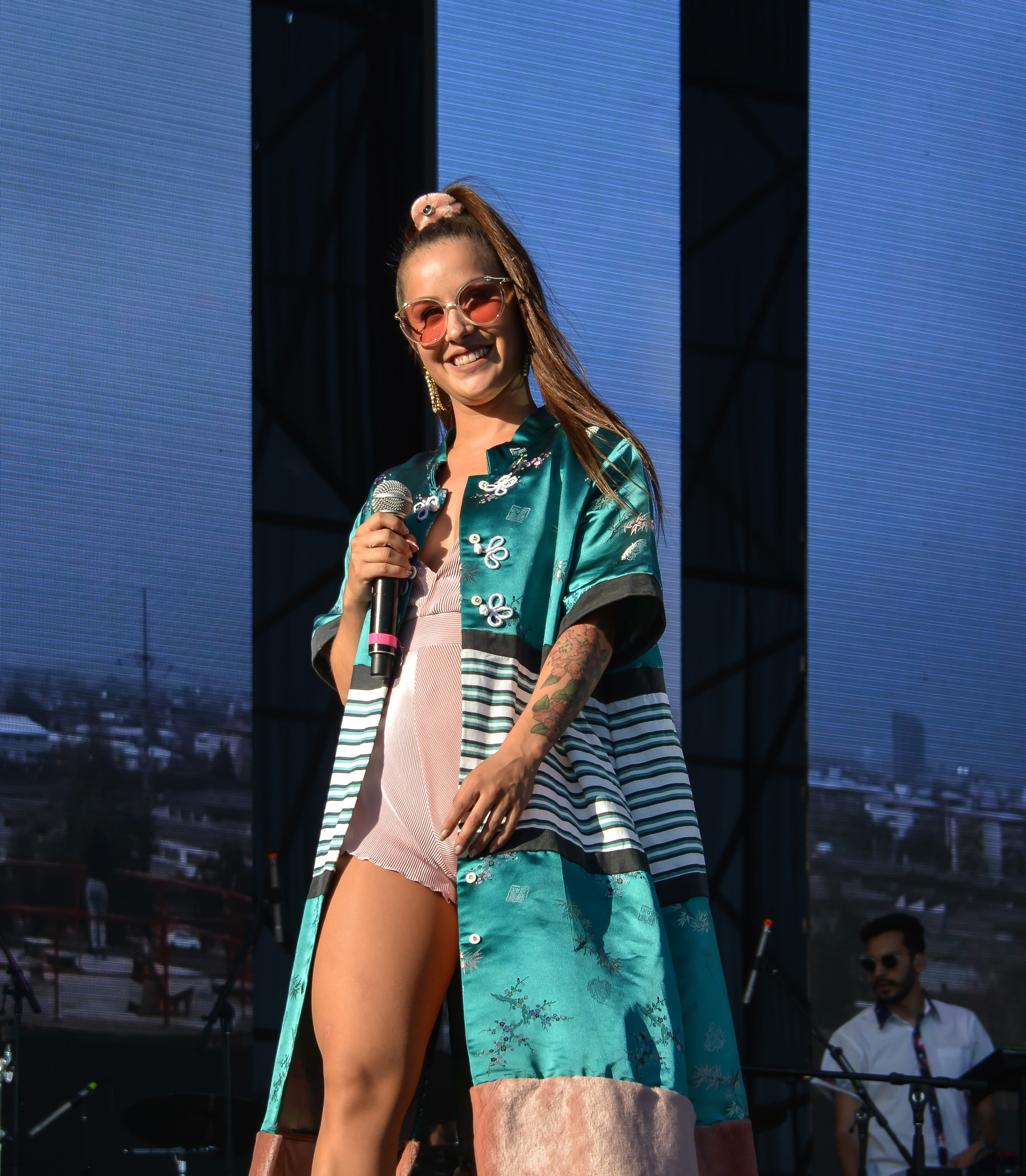 Denise Rosenthal en la Cumbre del Rock Chileno 2018, Santiago, Chile